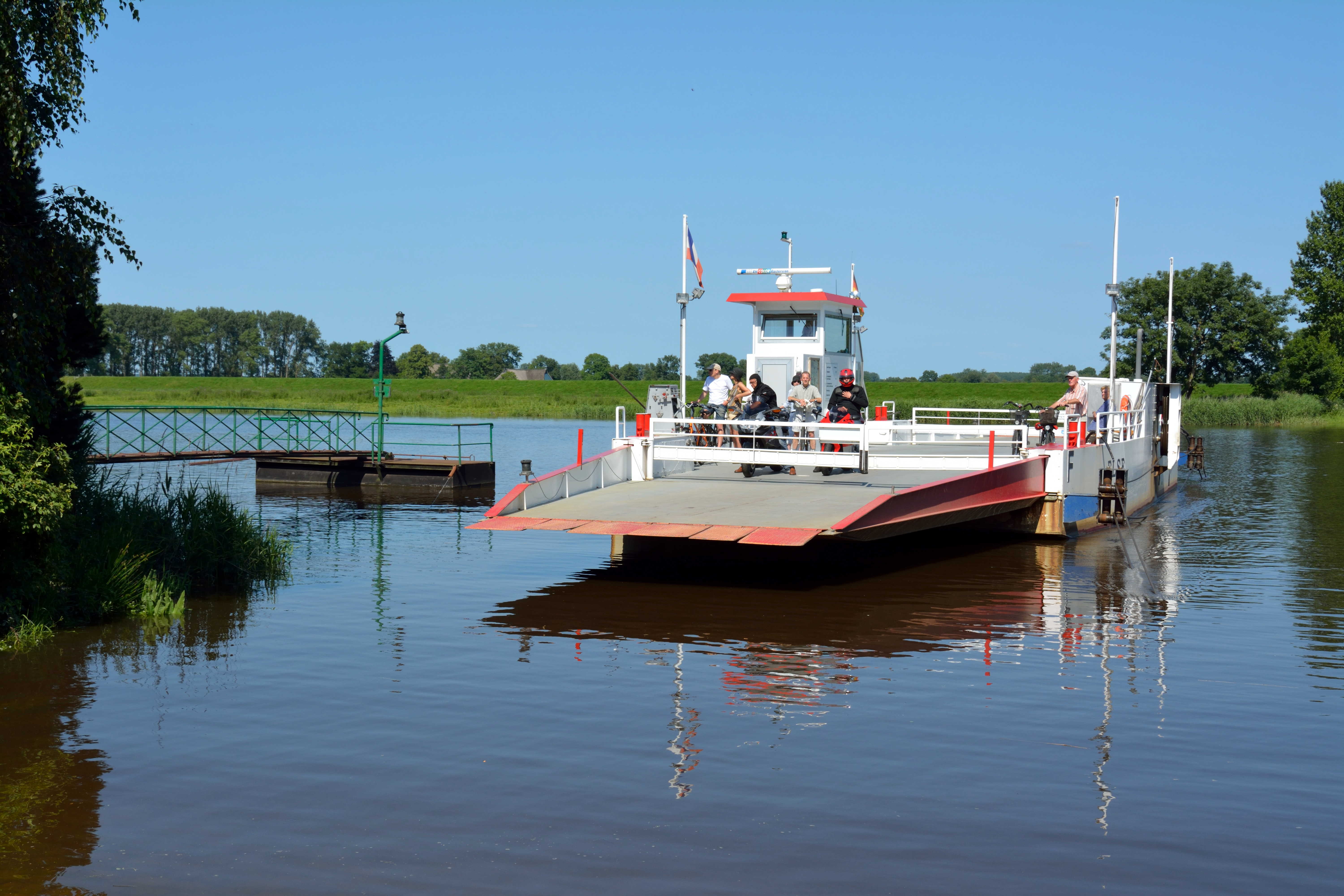 Die Störfähre Else, eine der letzten Seilfähren Deutschlands